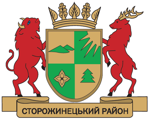 Герб Сторожинецького району